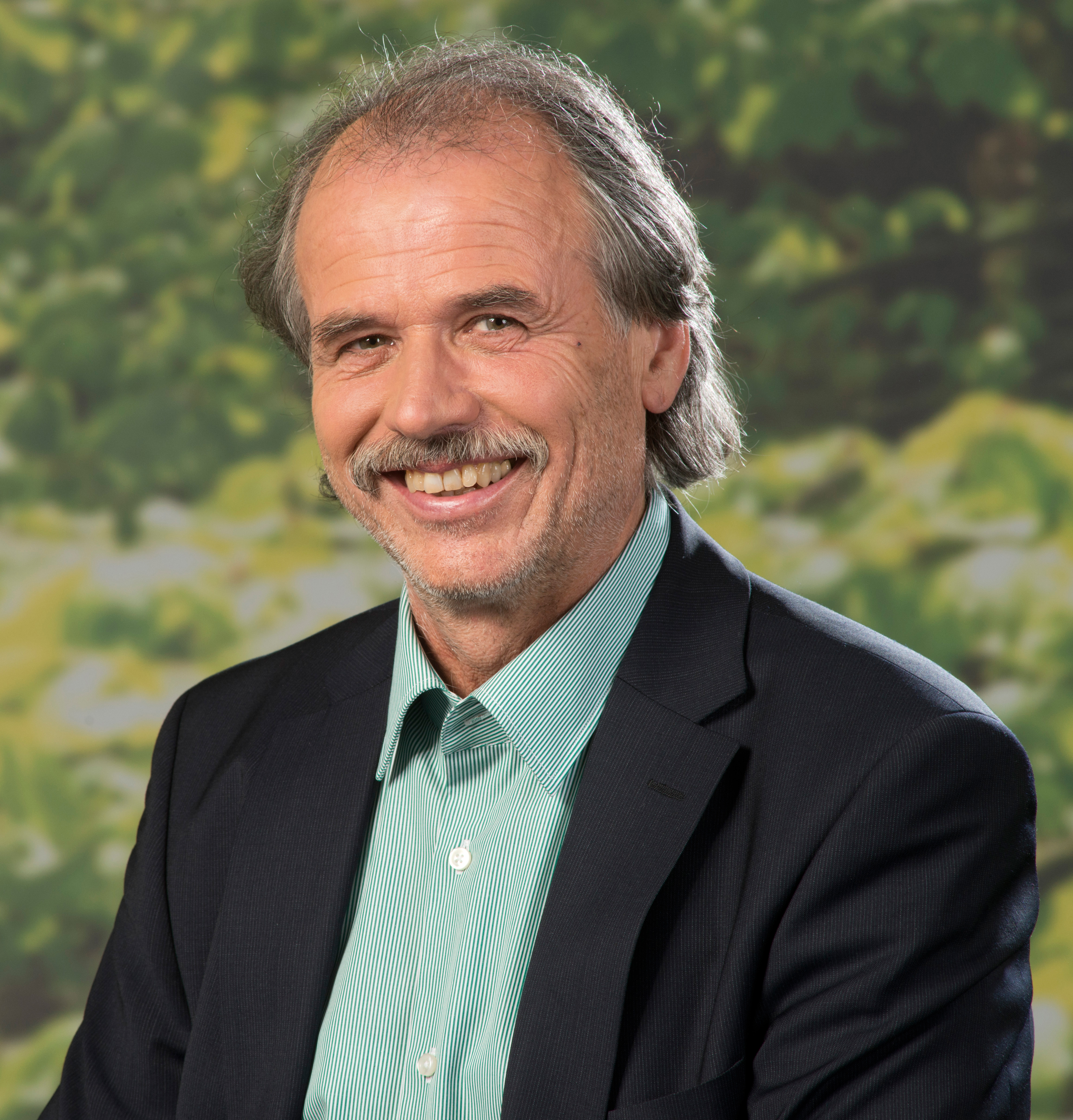 Urlich Leiner (2013)